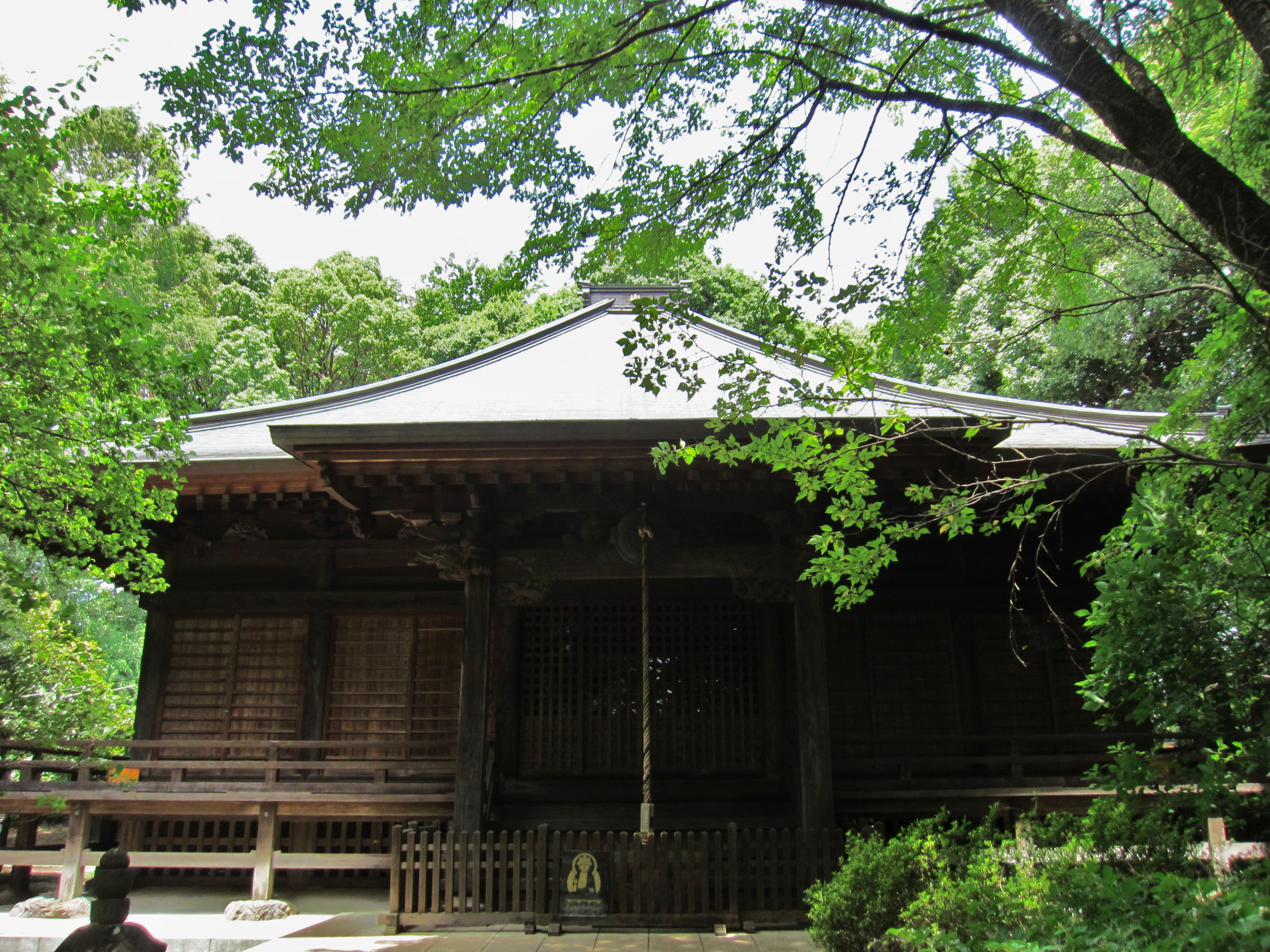 武蔵国分寺 薬師堂